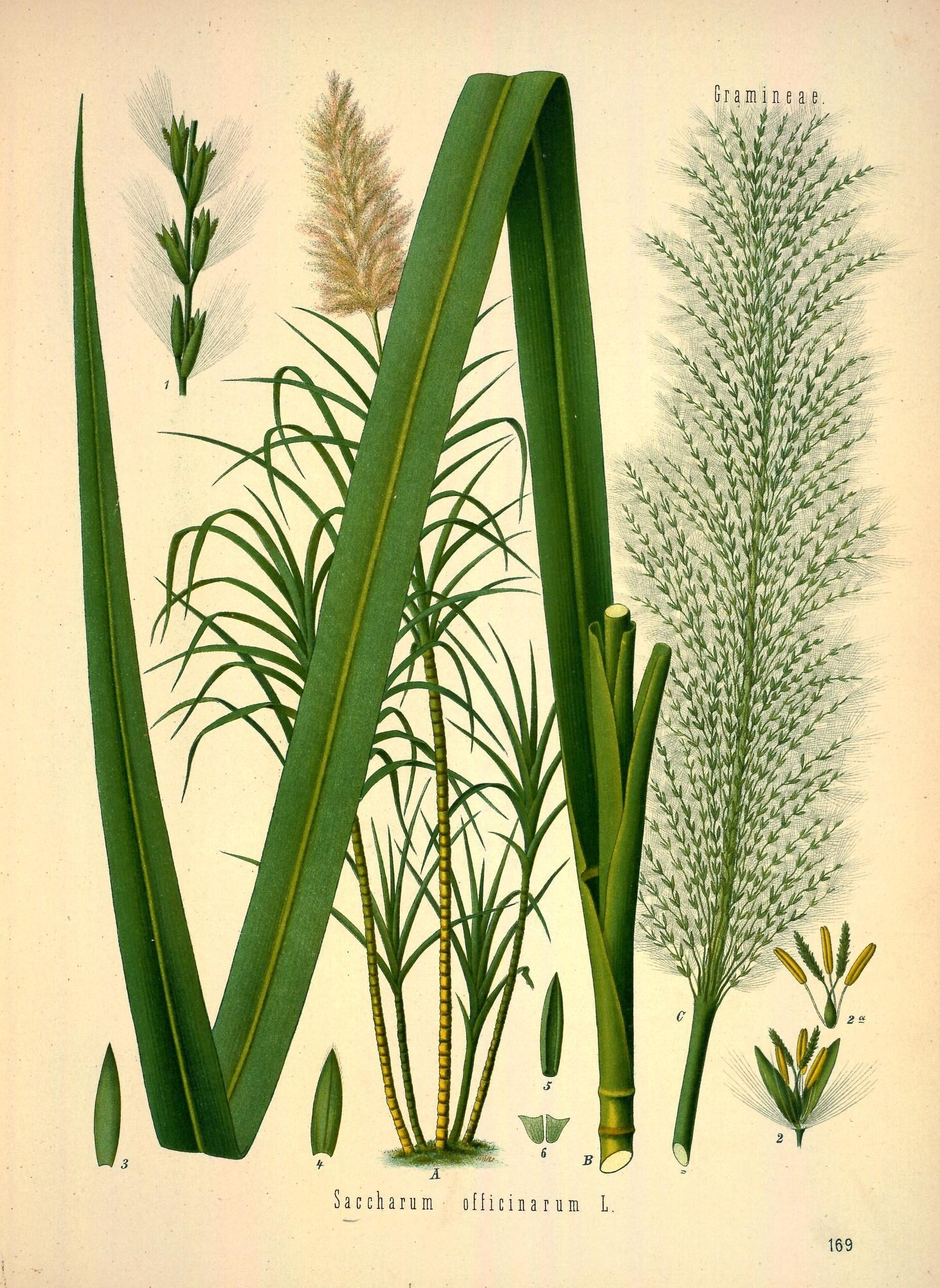 Zuckerrohr. A Pflanze, sehr verkleinert; B Stammstück mit Blatt, verkleinert; C Blüthenrispe, desgl.; 1 Theil eines Rispenastes, vergrössert; 2 Blüthe, desgl.; 2a Blüthe ohne Spelzen, desgl.; 3 Deckspelze, desgl.; 4 untere Hüllspelze, desgl.; 5 obere Hüllspelze, desgl.; 6 Blüthenhülle, desgl.